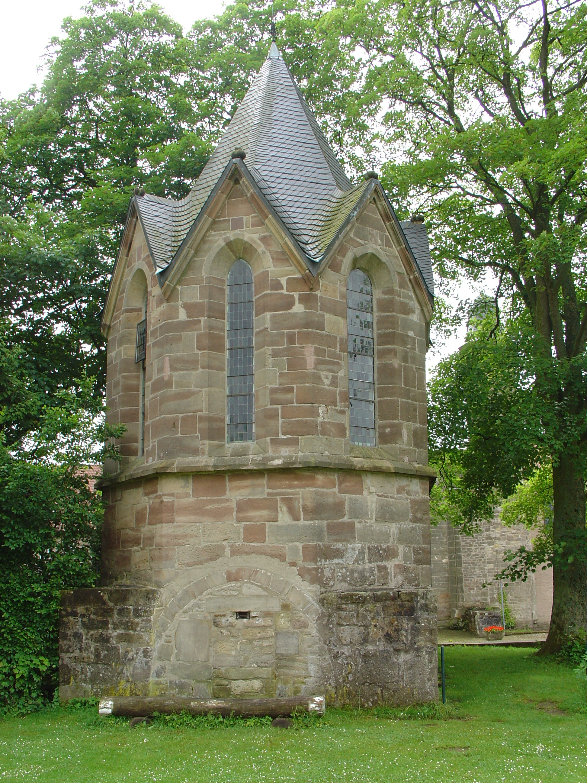 Kapelle am Kloster Hardehausen